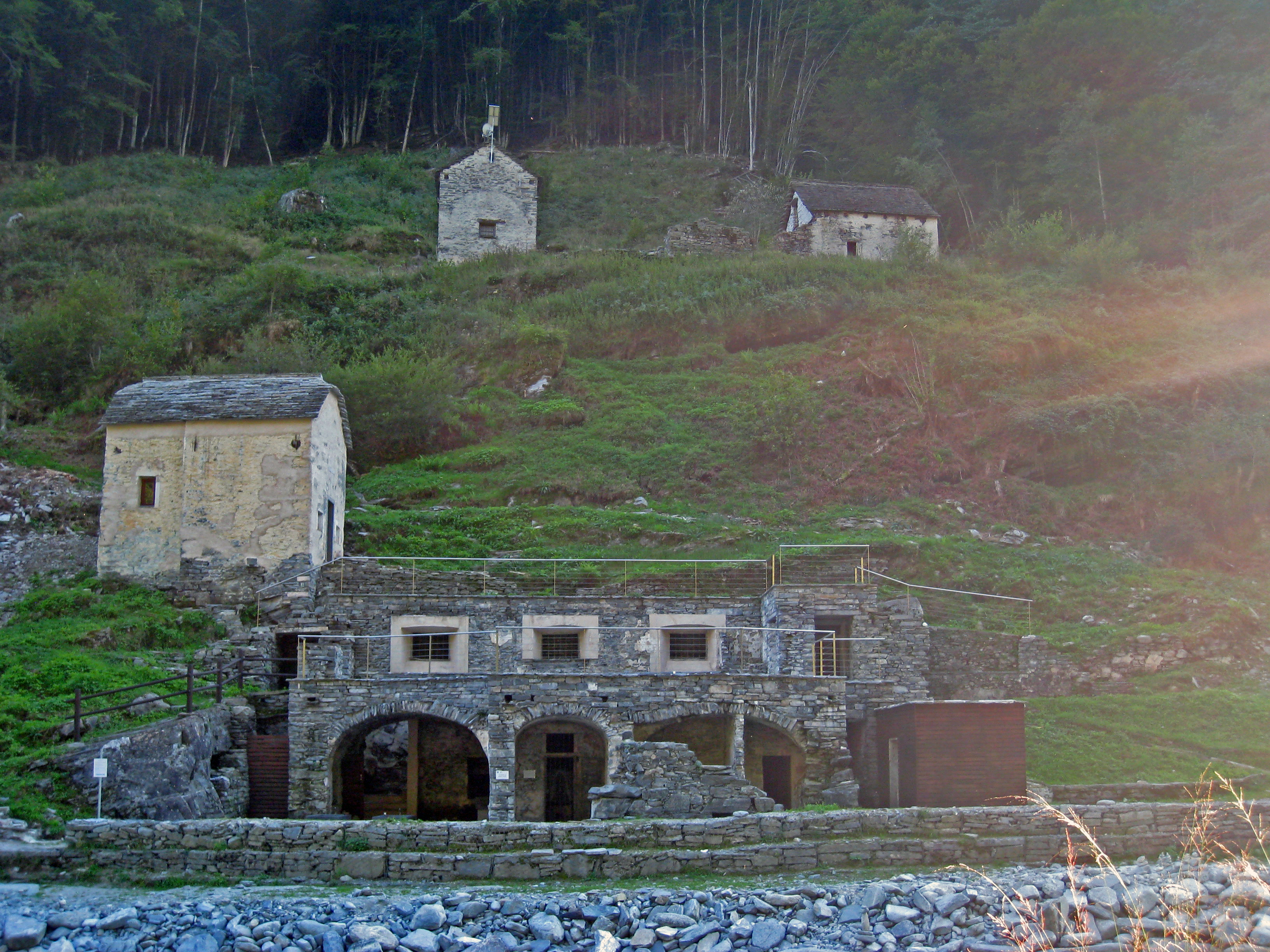 Bagni di Craveggia